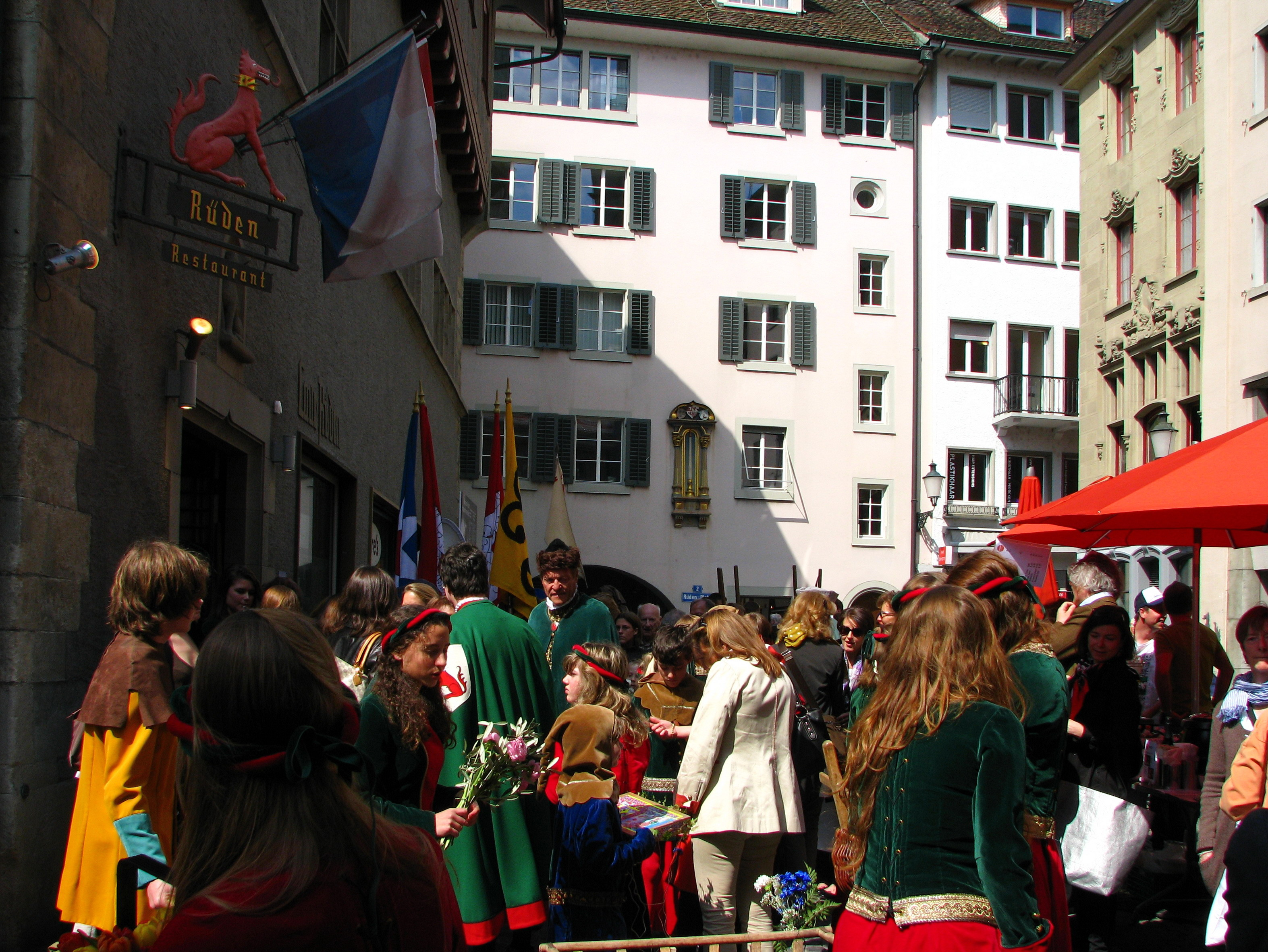 Rüden-Platz respectively guild house in Zürich-Rathaus (Switzerland)